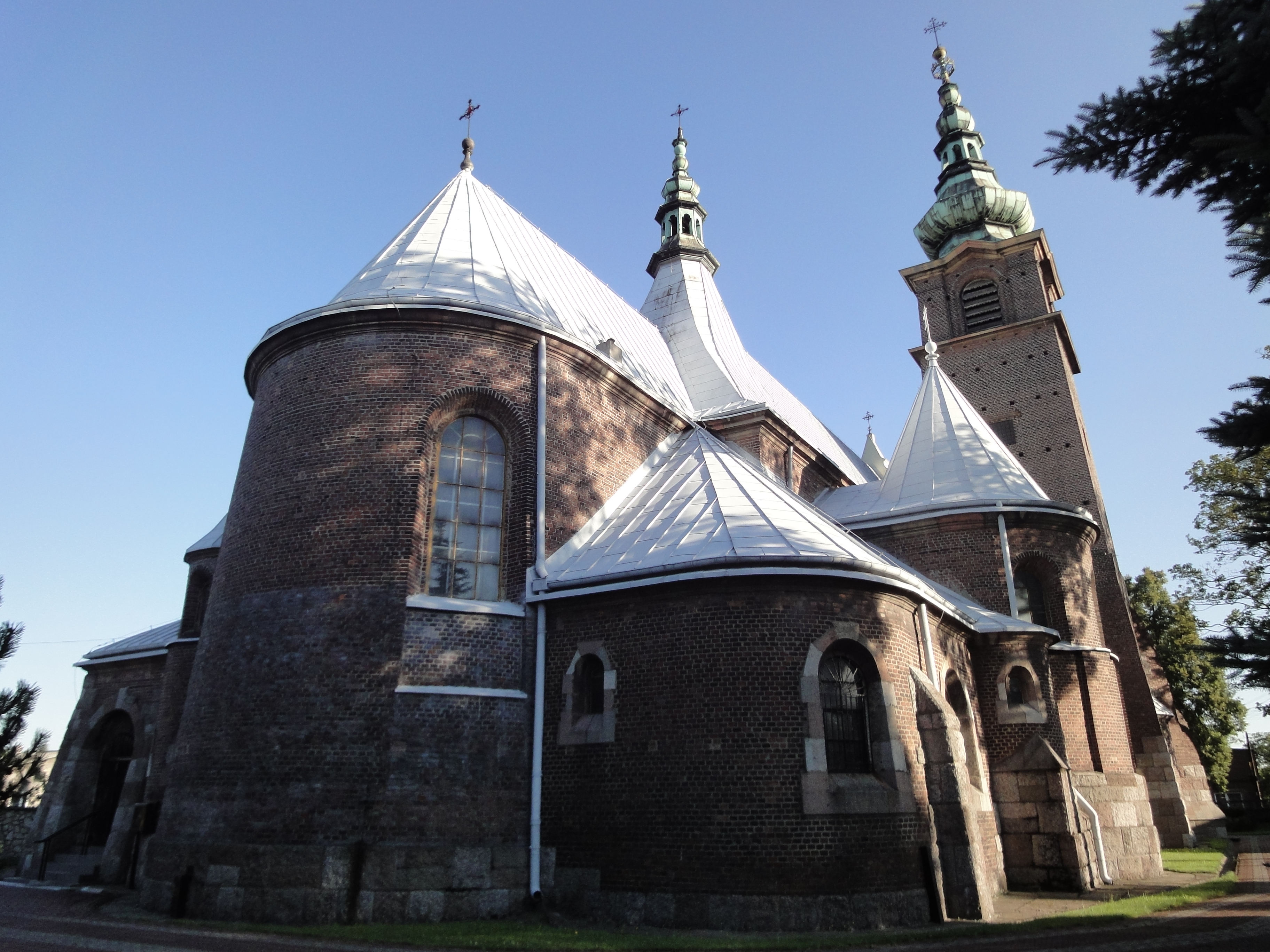 Tylna część kościoła św. Antoniego, widok z ulicy Długosza